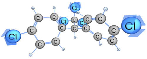 Ein dreidimensionales Abbild des Dichlordiphenyltrichlorethan-Moleküls